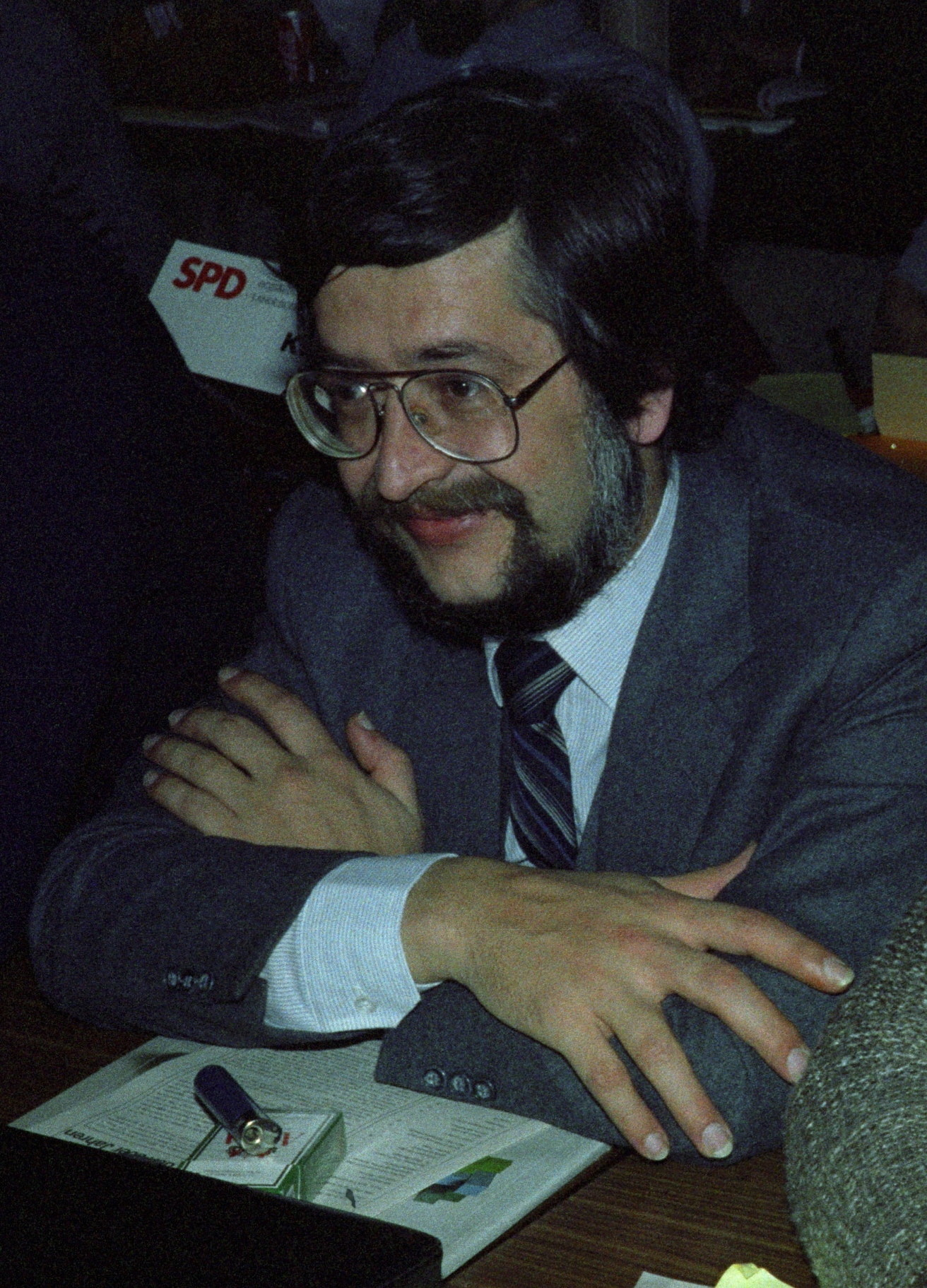 Porträt Heinz Paetz, Hamburger Bürgerschaftsabgeordneter und Steuerberater